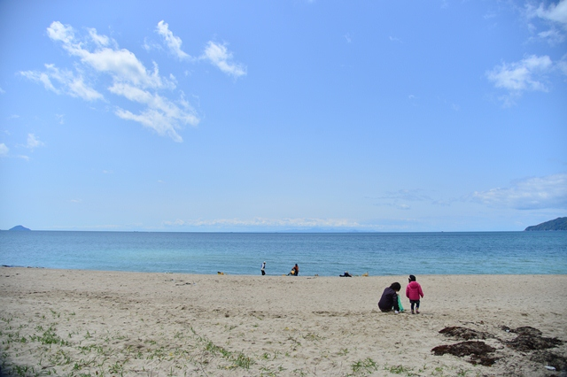 虹ヶ浜海水浴場。2013年4月下旬撮影。撮影者のブログはこちら。